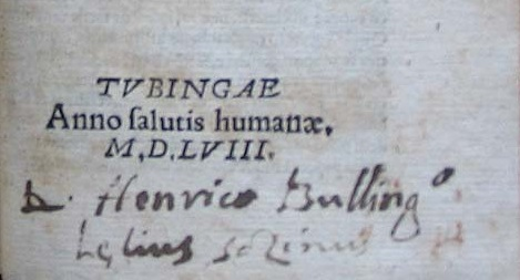 Dedica di Lelio Sozzini a Heinrich Bullinger del libro "Dialogus de Missa" di Paulus Scalichius (croat. Pavao Skalić)